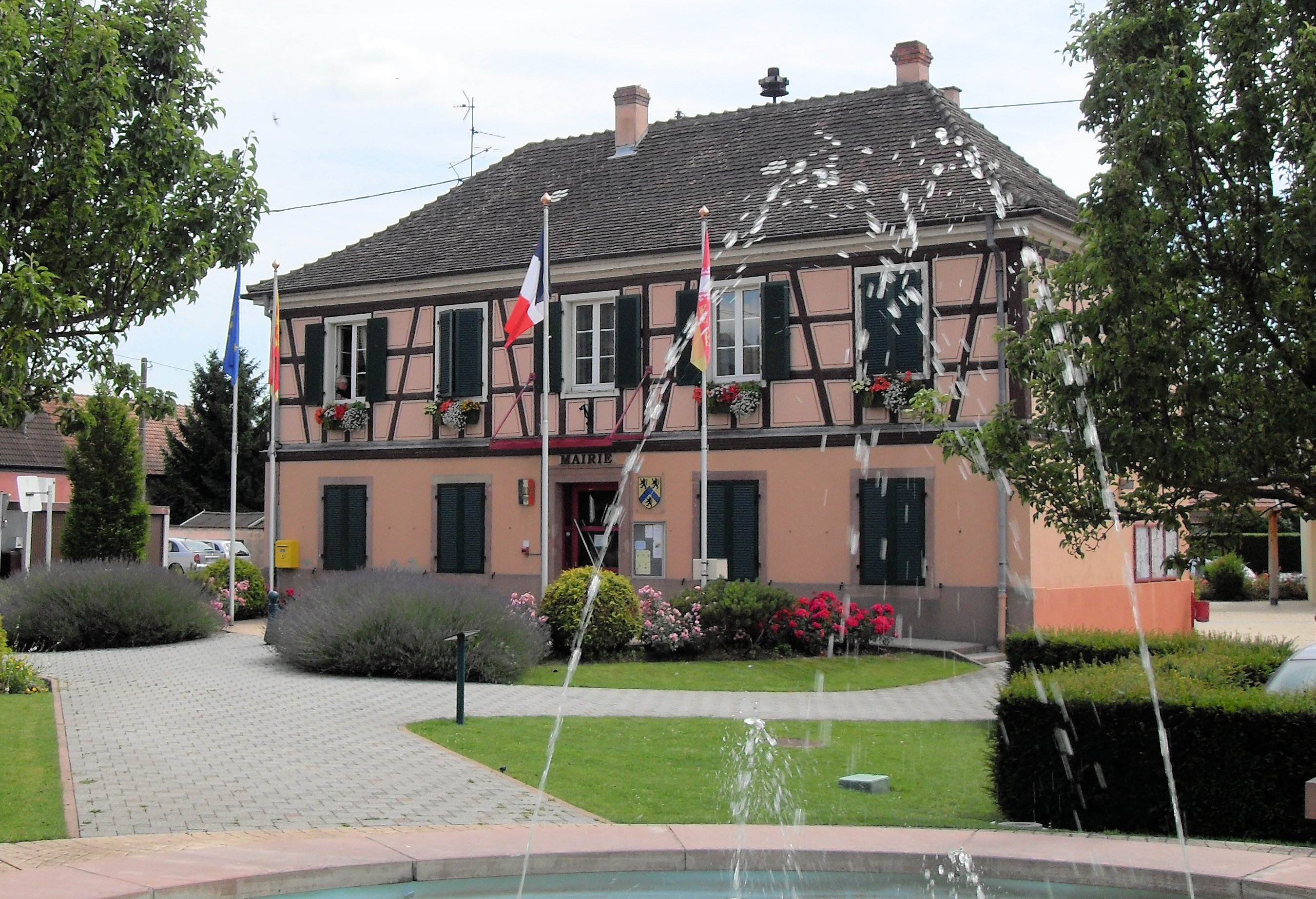 La mairie de Wolfgantzen